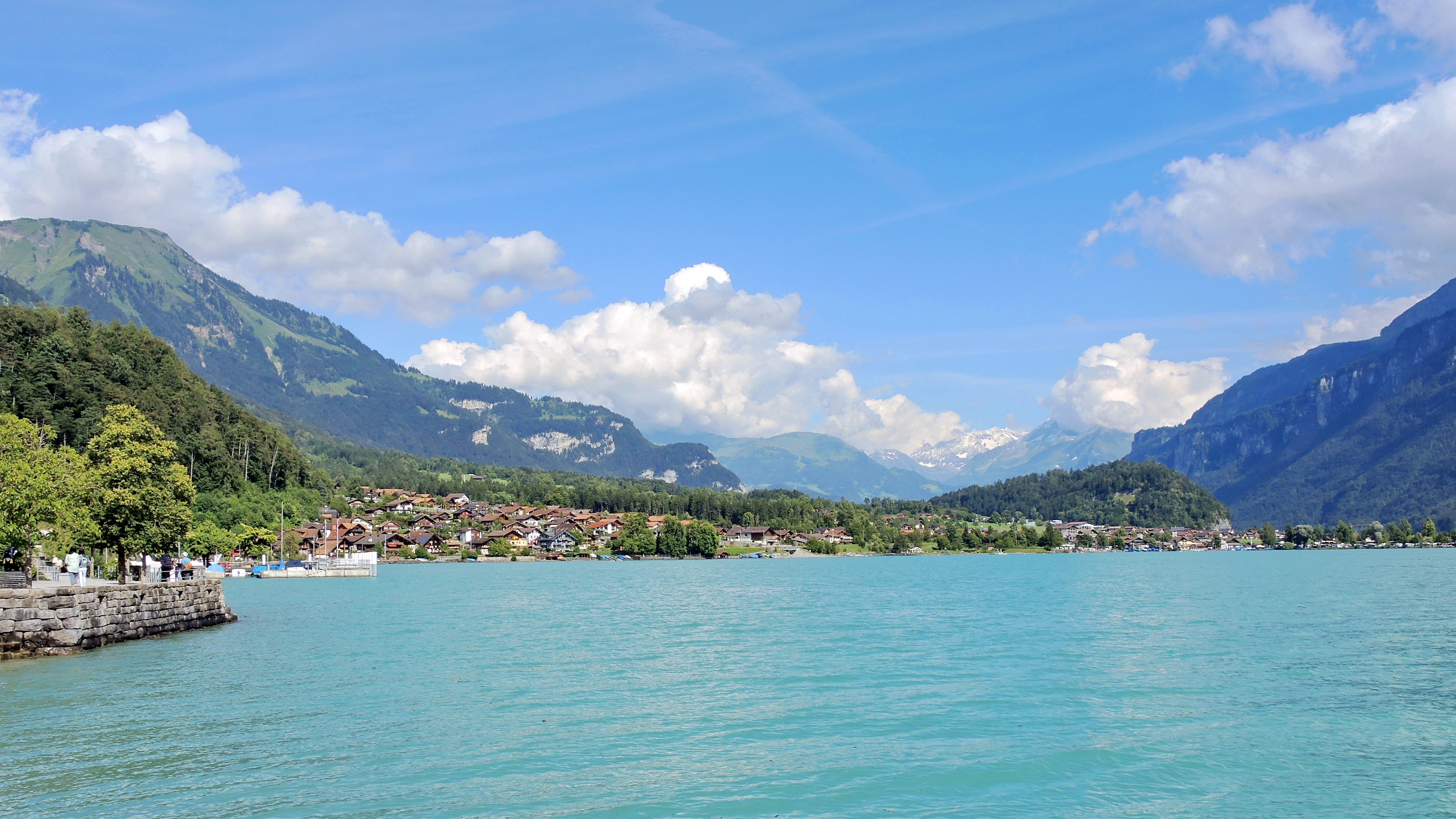 Brienz on Brienzersee lake shore in Switzerland